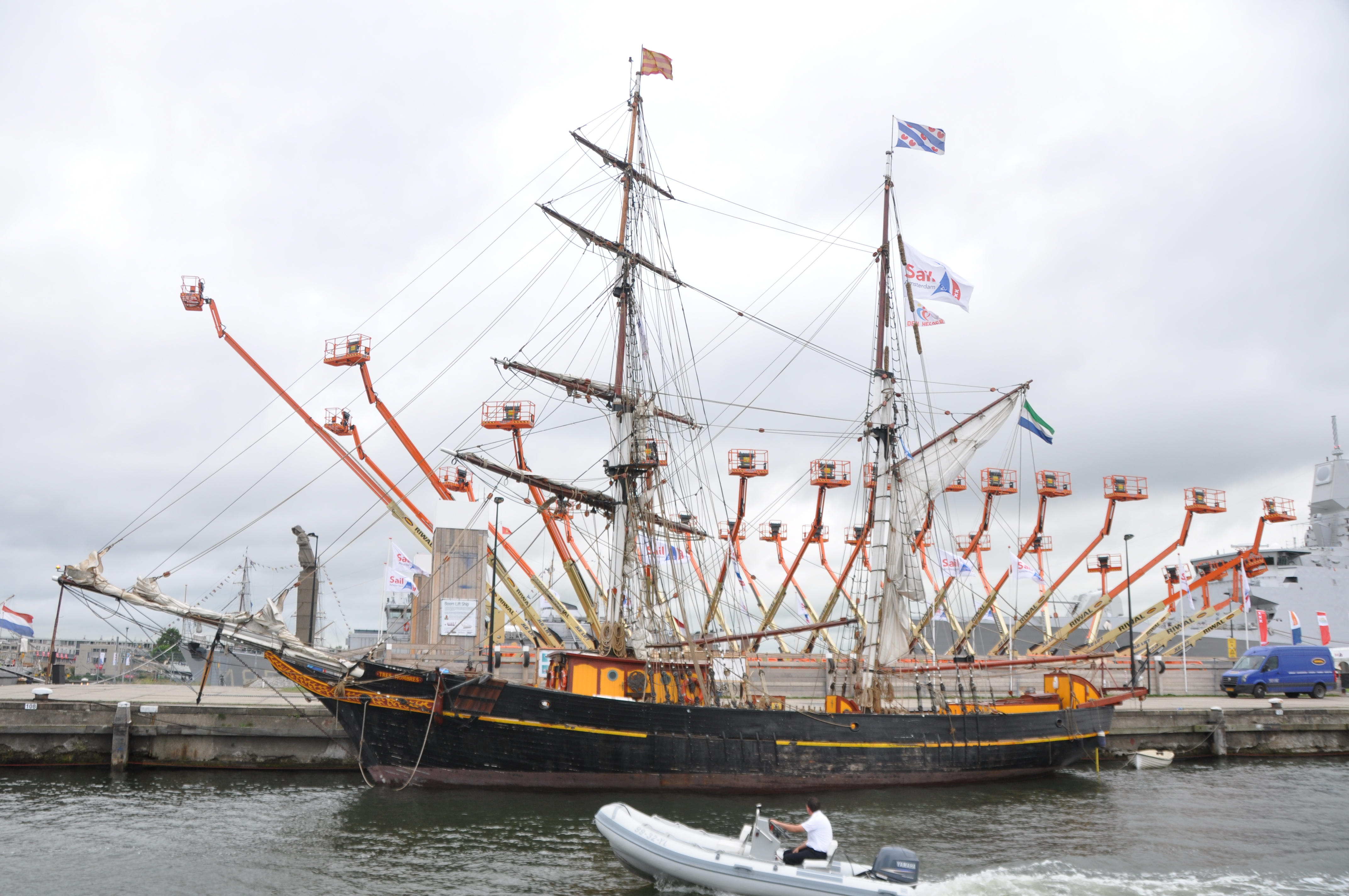 De TRES HOMBRES voor de wal in Amsterdam.